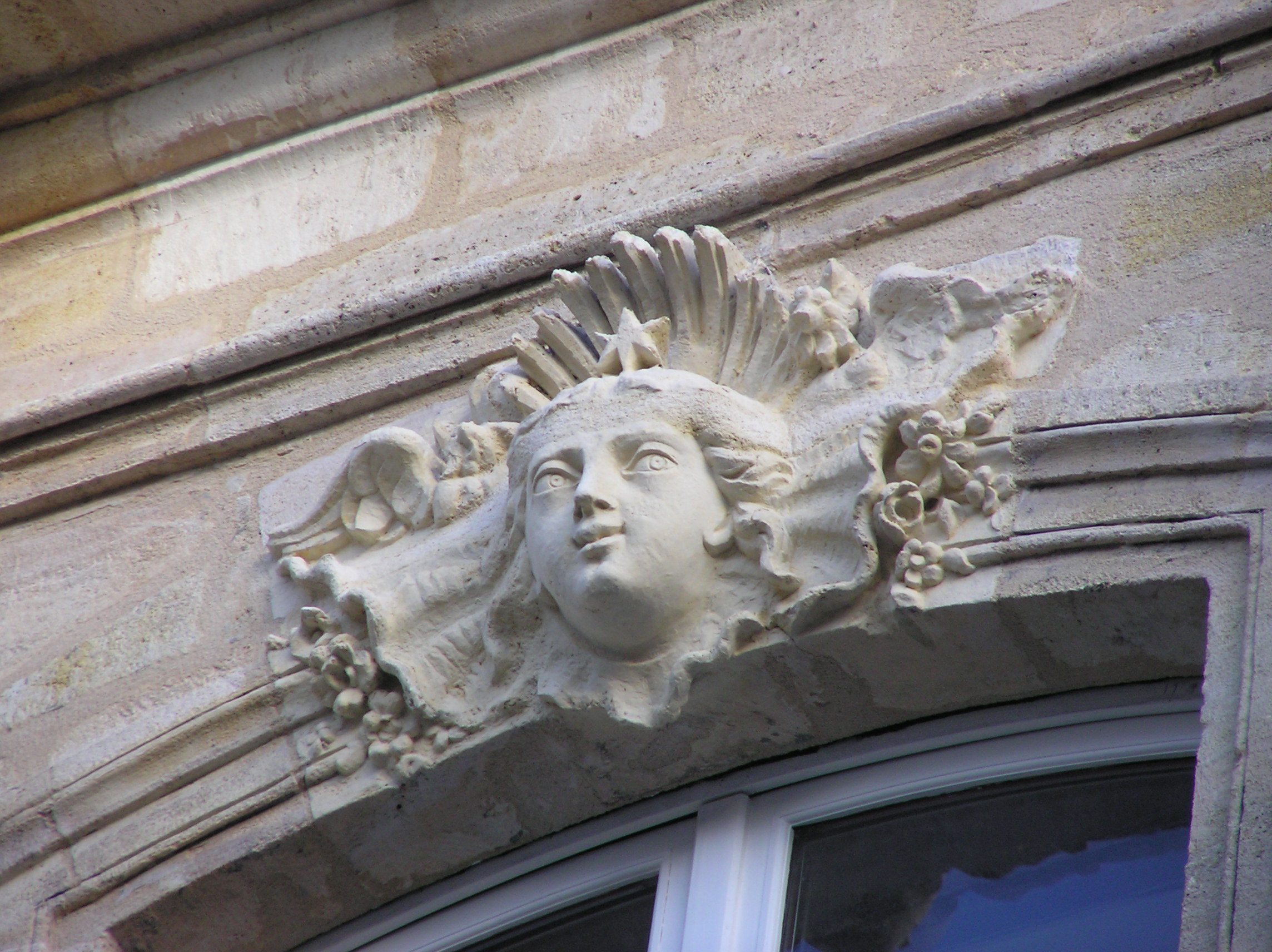 Bordeaux mascaron Etoile de David rue du Mirail créé en 1719